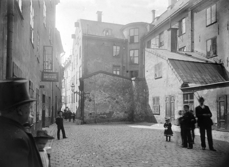 Baggensgatan söderut vid Baggensplan, Fastigheten ANDROMEDA 2. Baggensgatan 20. Gamla Stan.